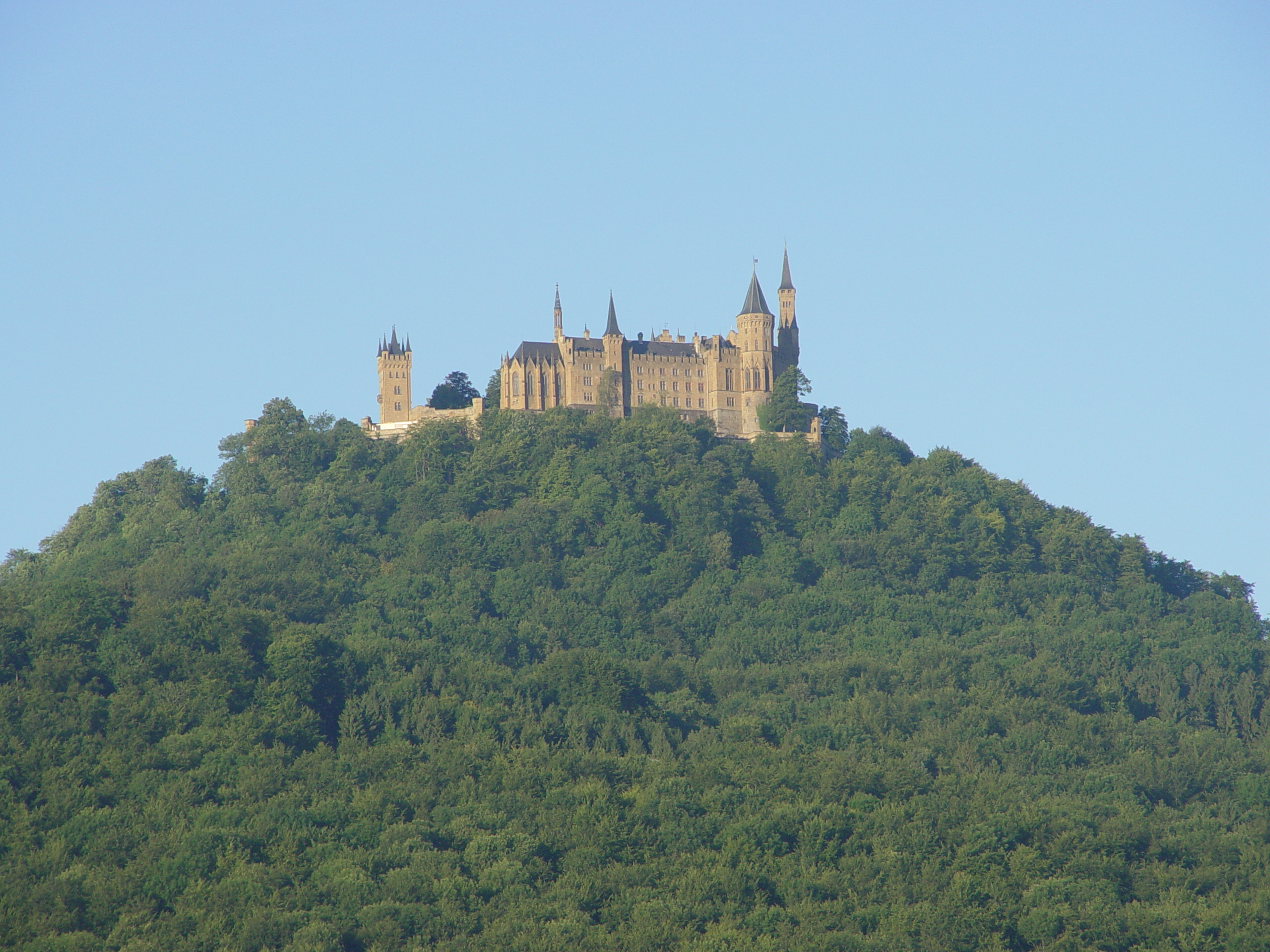 Burg Hohenzollern kurz nach Sonnenaufgang